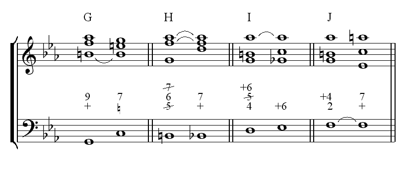 Description : Neuvième mineure de dominante complet - enchaînement exceptionnel Source : Personnelle Licence : GFDL